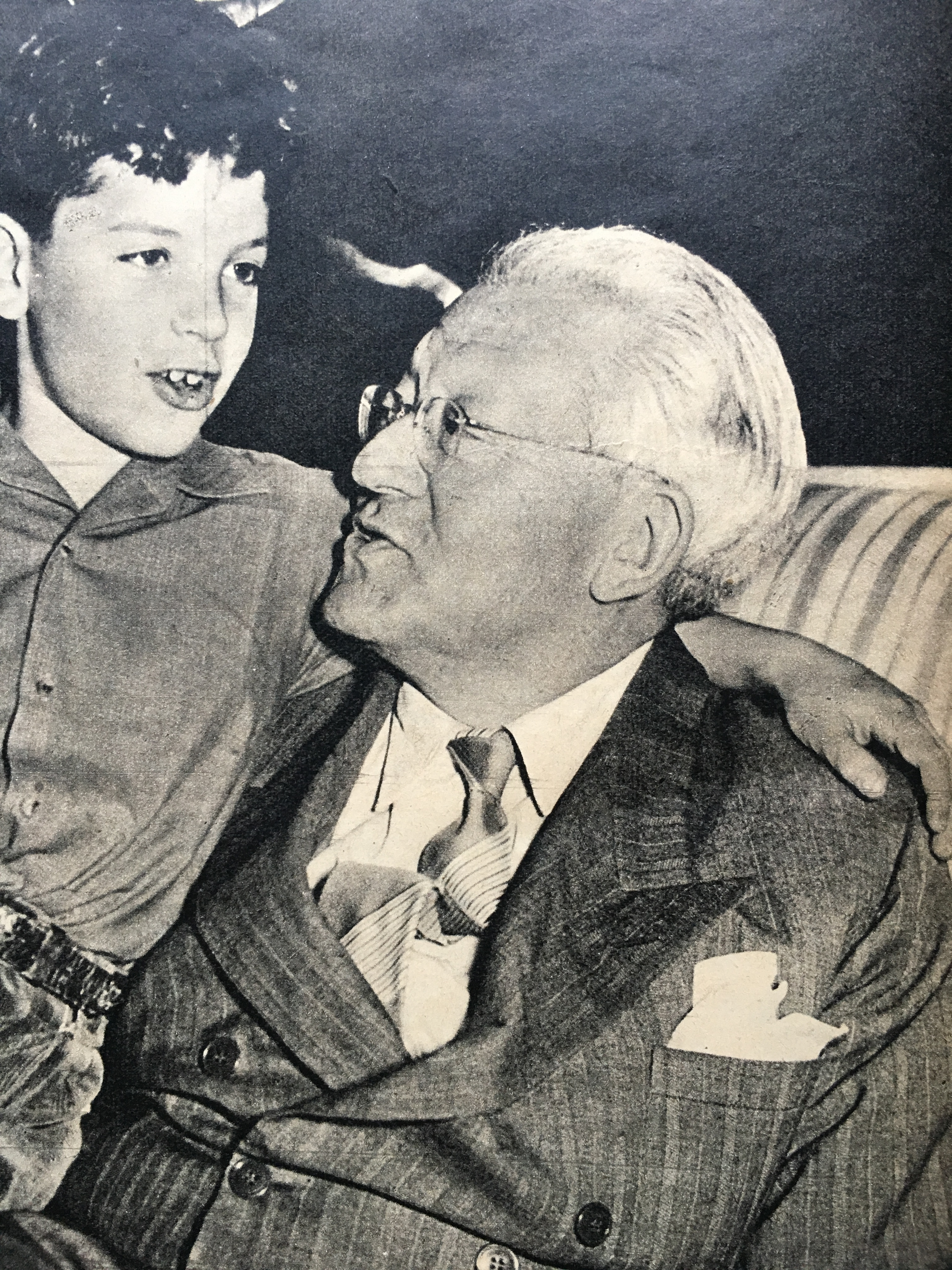 Arthur Rodzinski con il figlio Riki a Firenze nel 1953